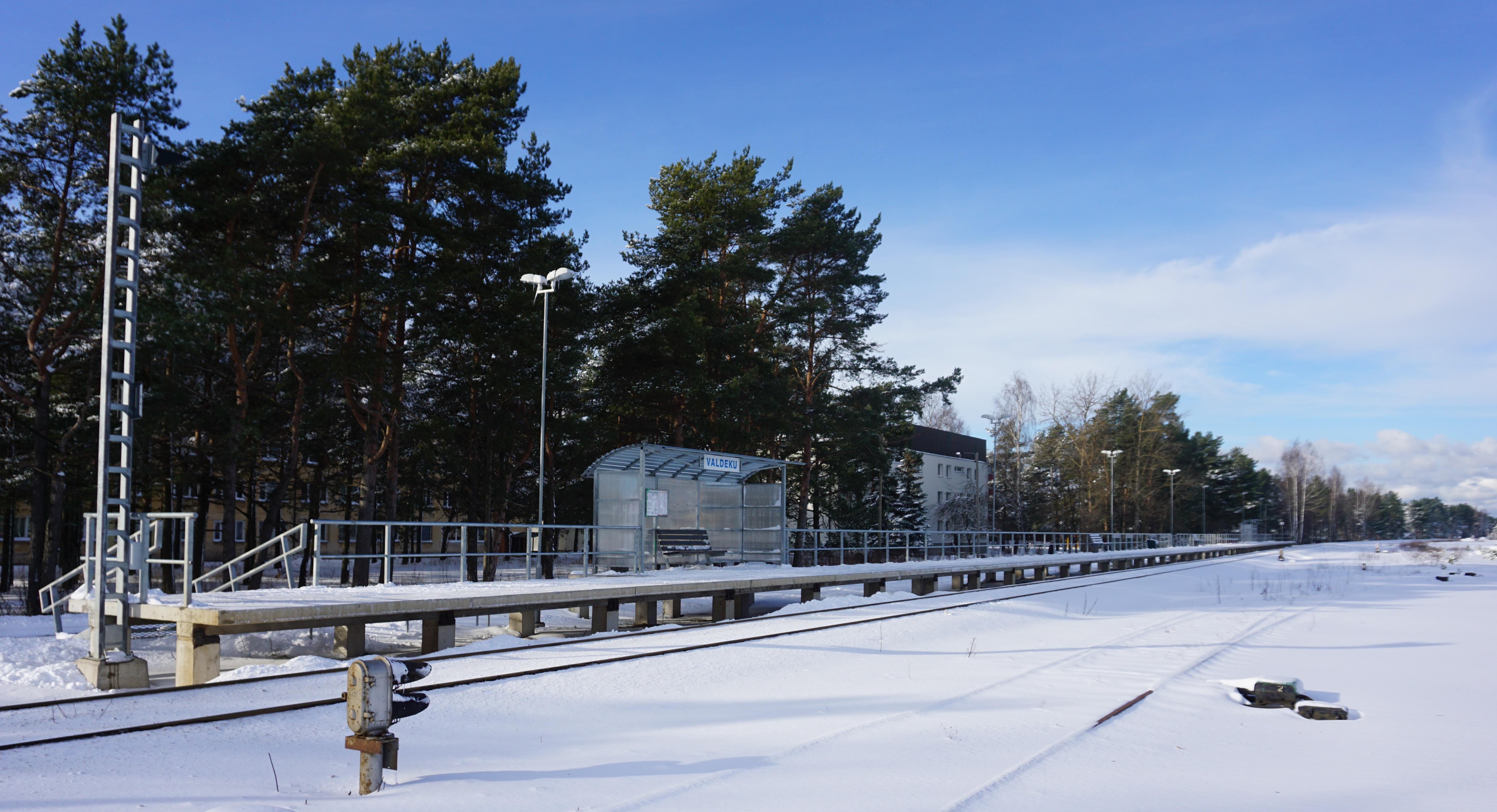 2017. aastal avatud Valdeku raudteepeatus.